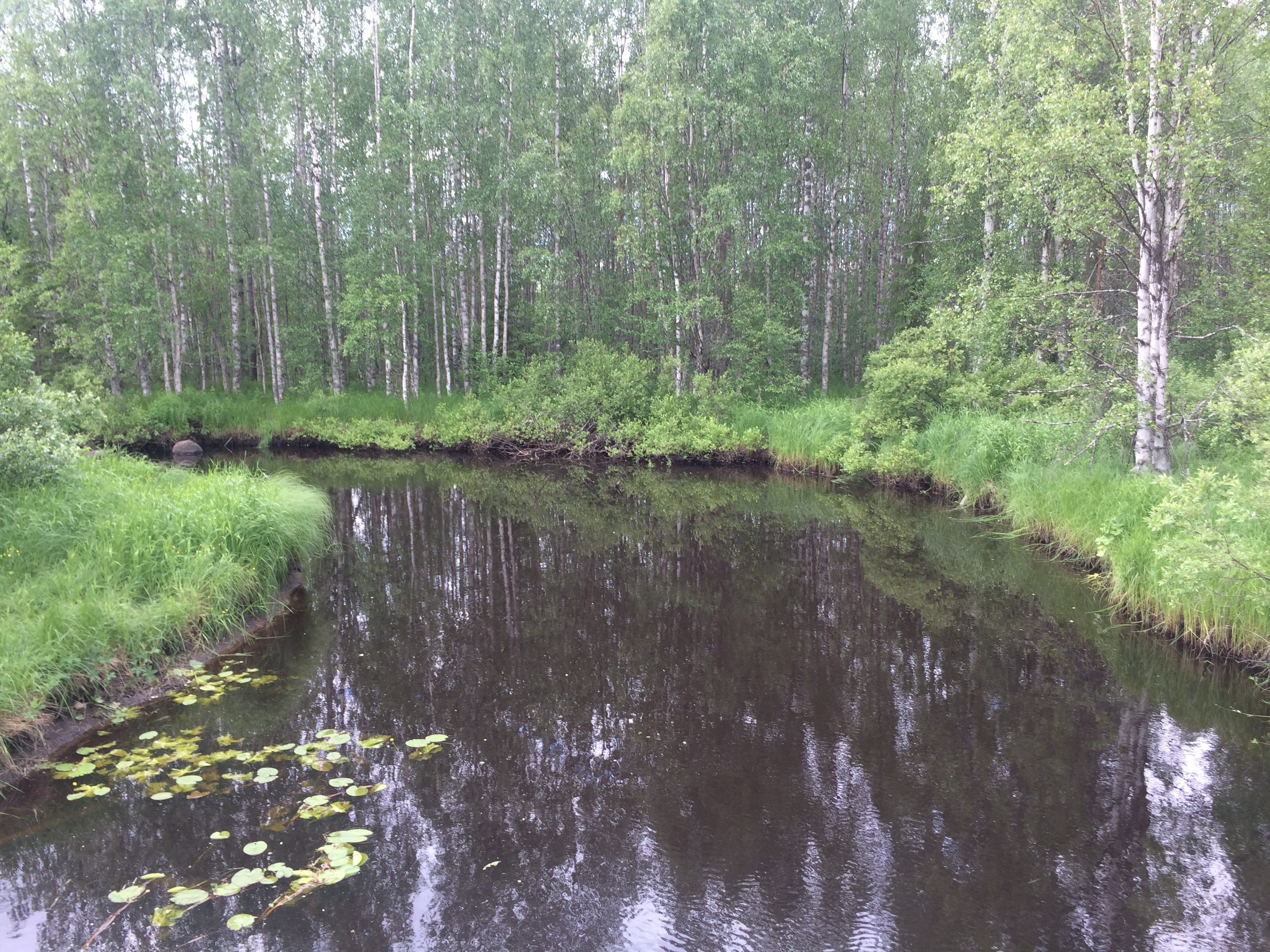 Шоба (река)